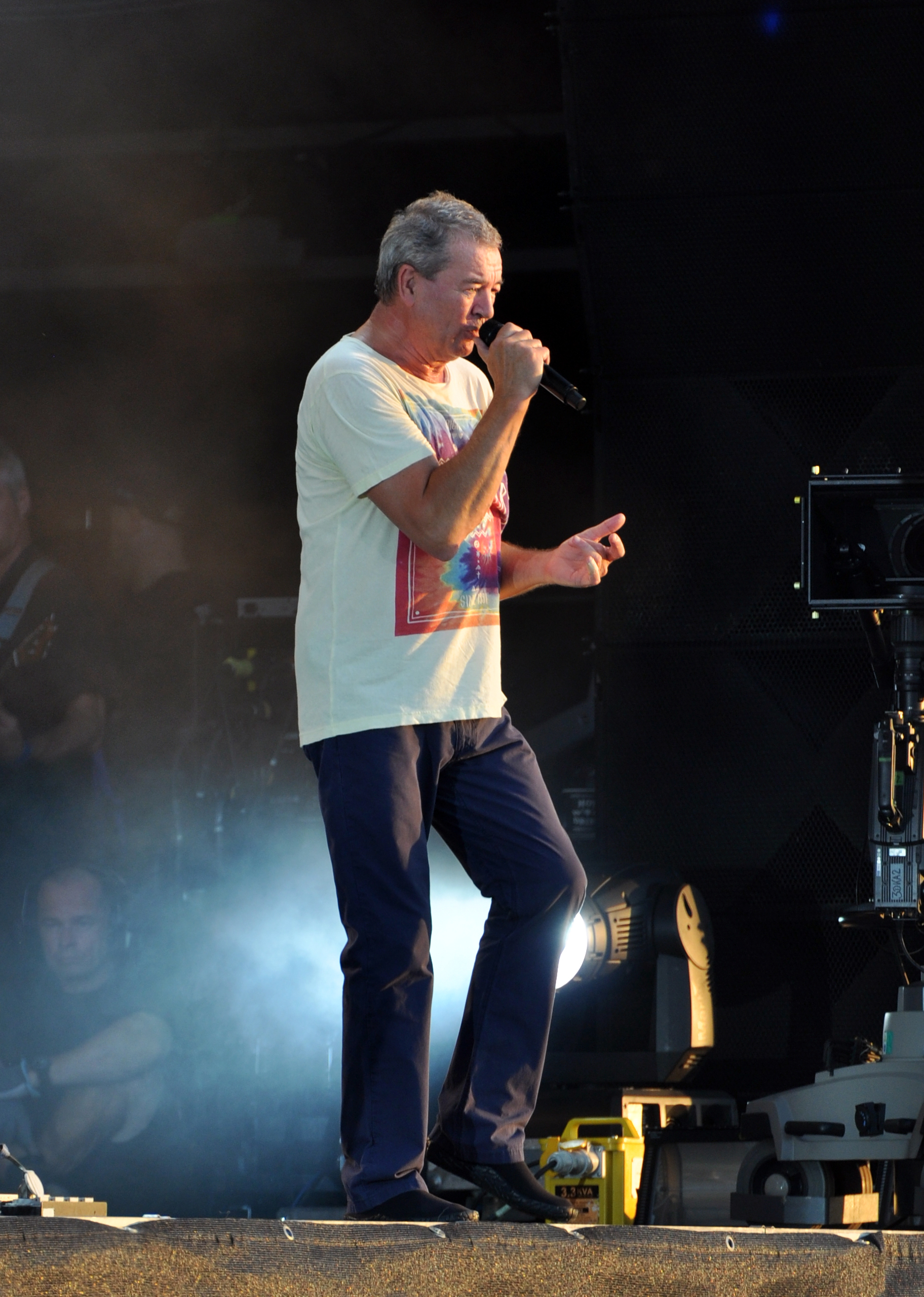 Deep Purple at Wacken Open Air 2013